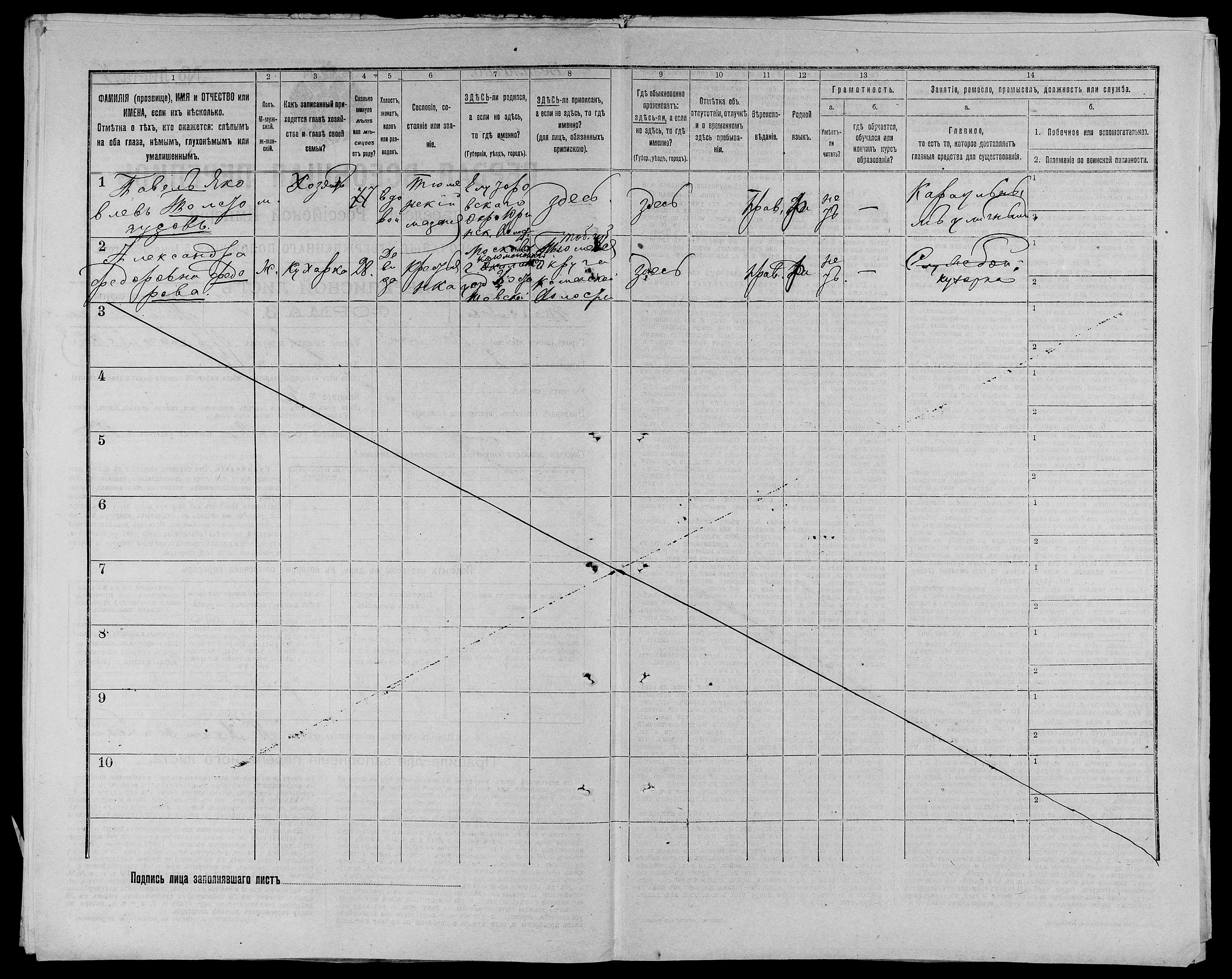 Перепись 1897, Тобольская губерния, г. Тюмень, П.Я. Толстогузов